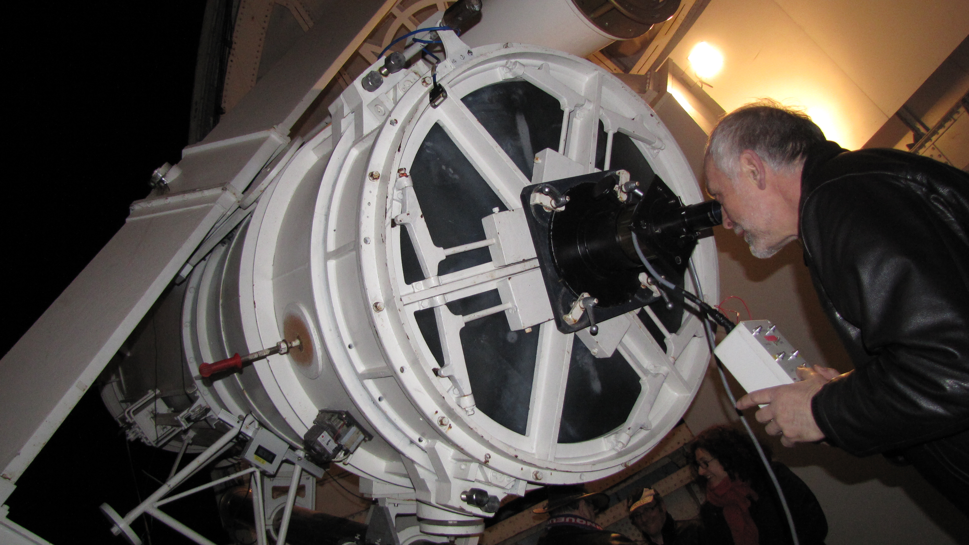 Dominique Proust au télescope Cassegrain de 1 mètre de l'Observatoire de Meudon.